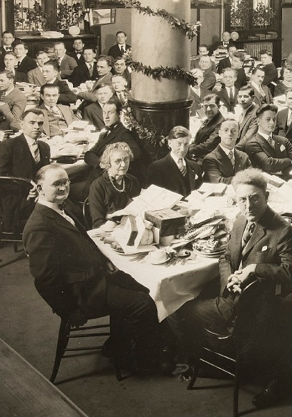 Dernier Noël au Béthel des Témoins de Jéhovah